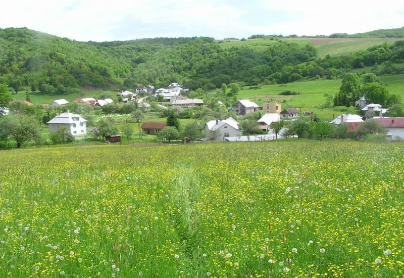 Celkový pohľad na Brezničku